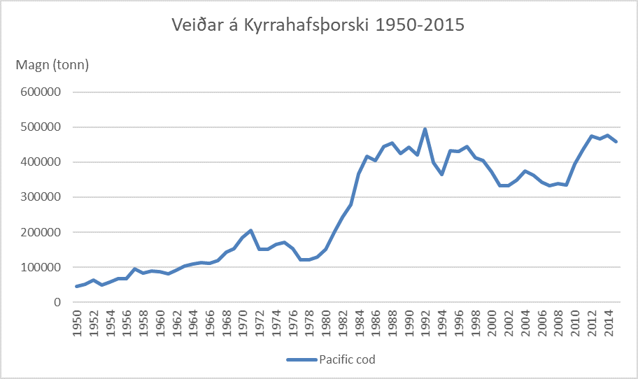 Veiðar á Kyrrahafsþorski 1950-2015